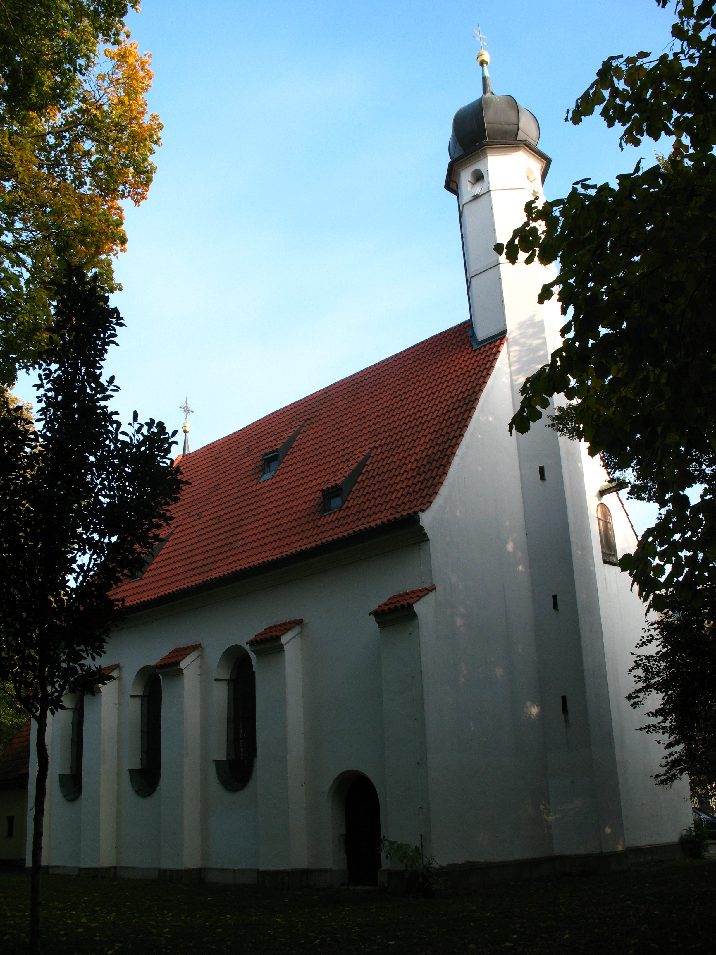 München, St. Nikolai Kirche, Normalbelichtung